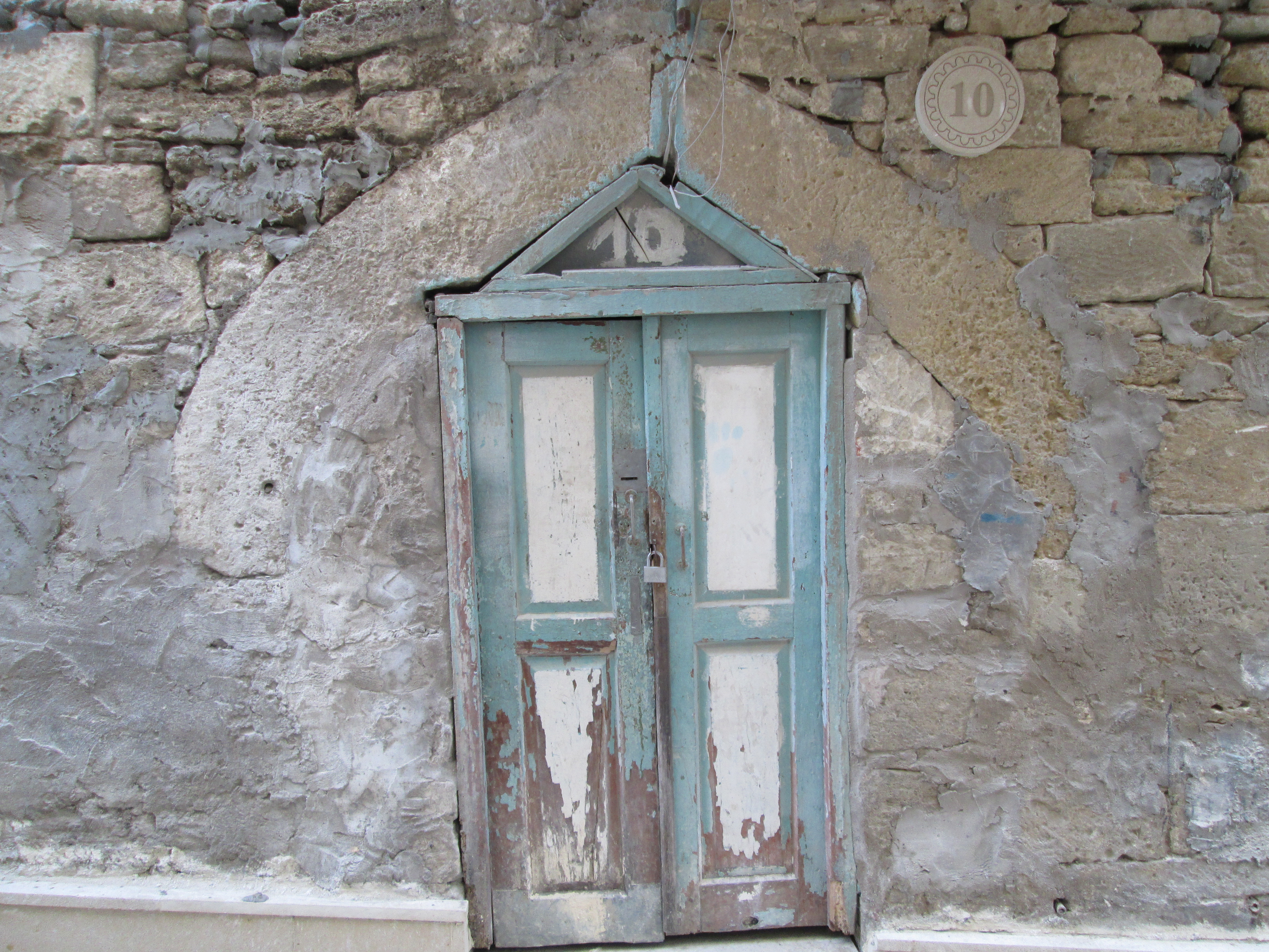 Hacı Heybət məscidi